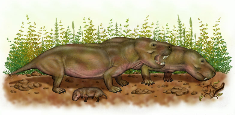 Exaeretodon frenguelli, a cynodont